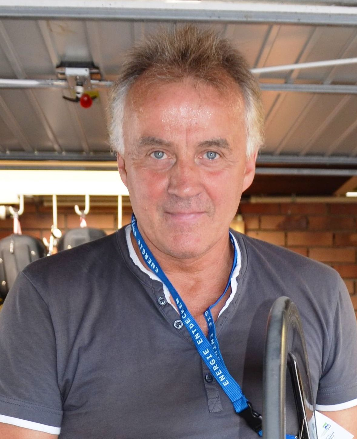 Gerald Mortag, deutscher Radsportler The making of this document was supported by the Community-Budget of Wikimedia Germany.